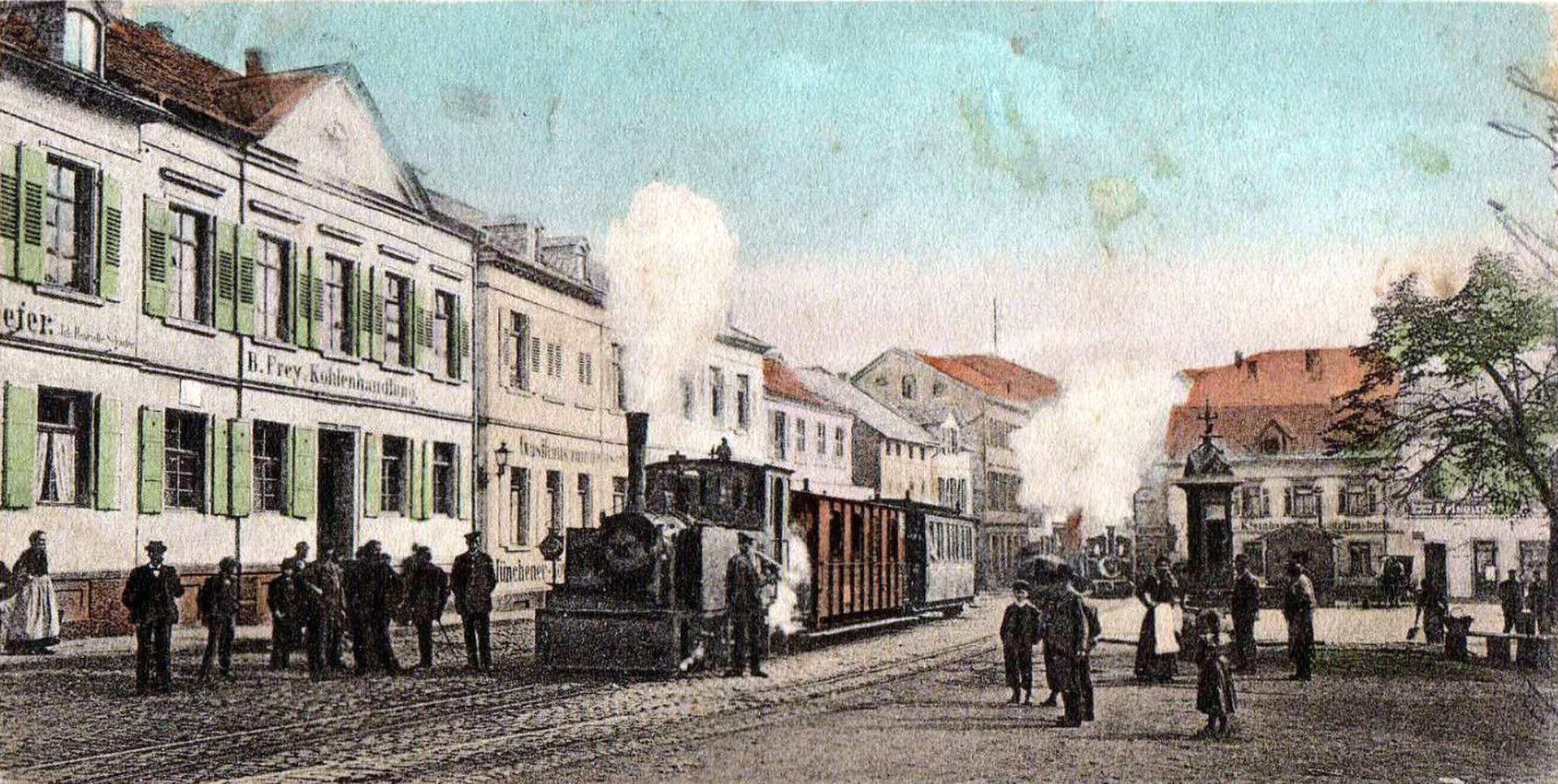 Postkarte des Holzmarkt mit Kleinbahn in Bad Kreuznach, erstellt um 1906 Kartenausschnitt.